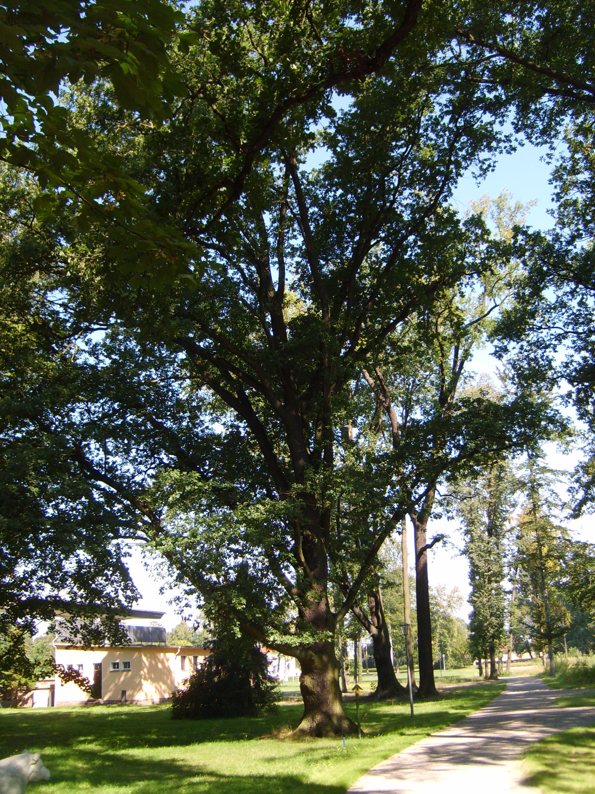 Schlosspark Lauchhammer-West